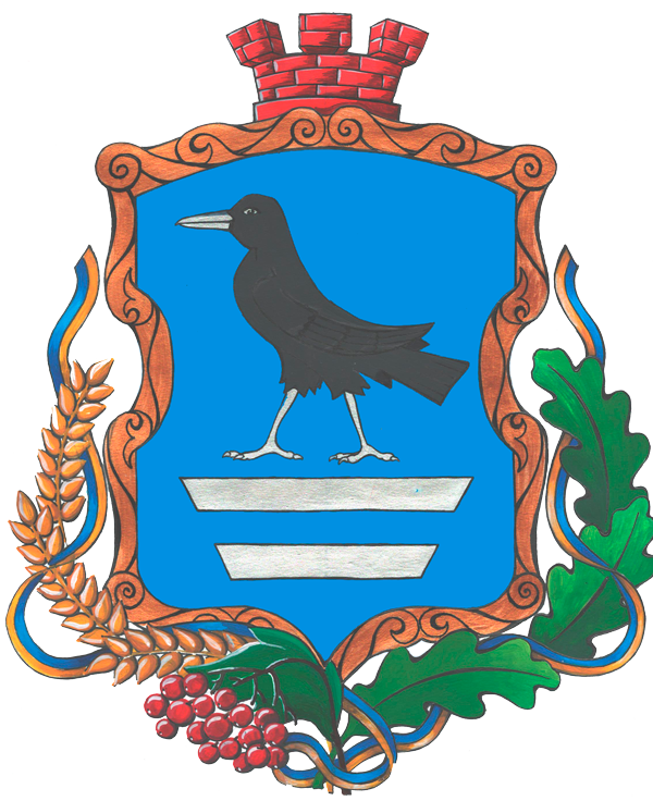 Герб смт Вороніж Шосткинського району Сумської області від 25 липня 2017 року